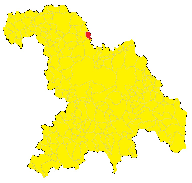 Mappa del comune di Bozzole (AL)